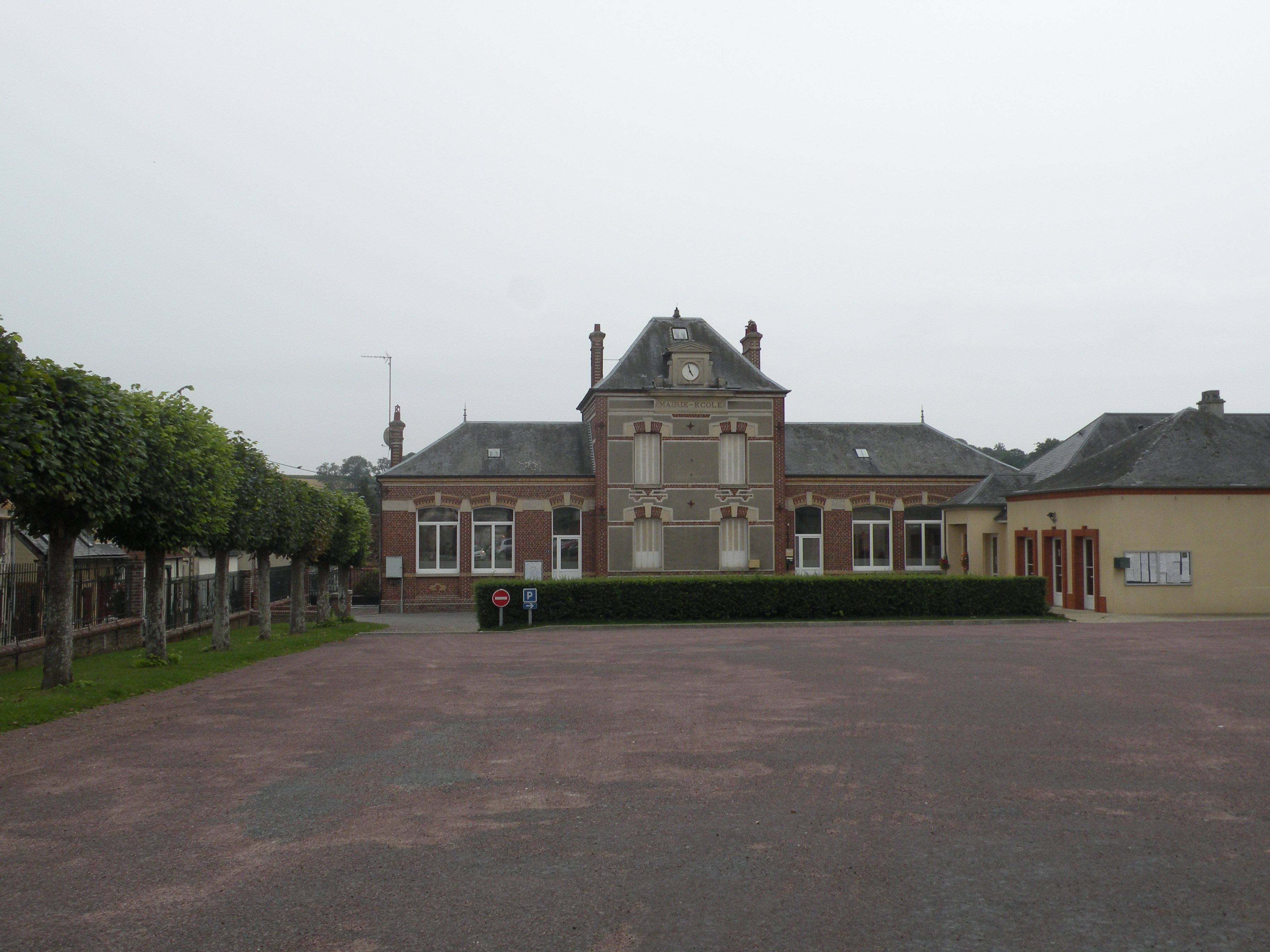 Crillon (Oise)